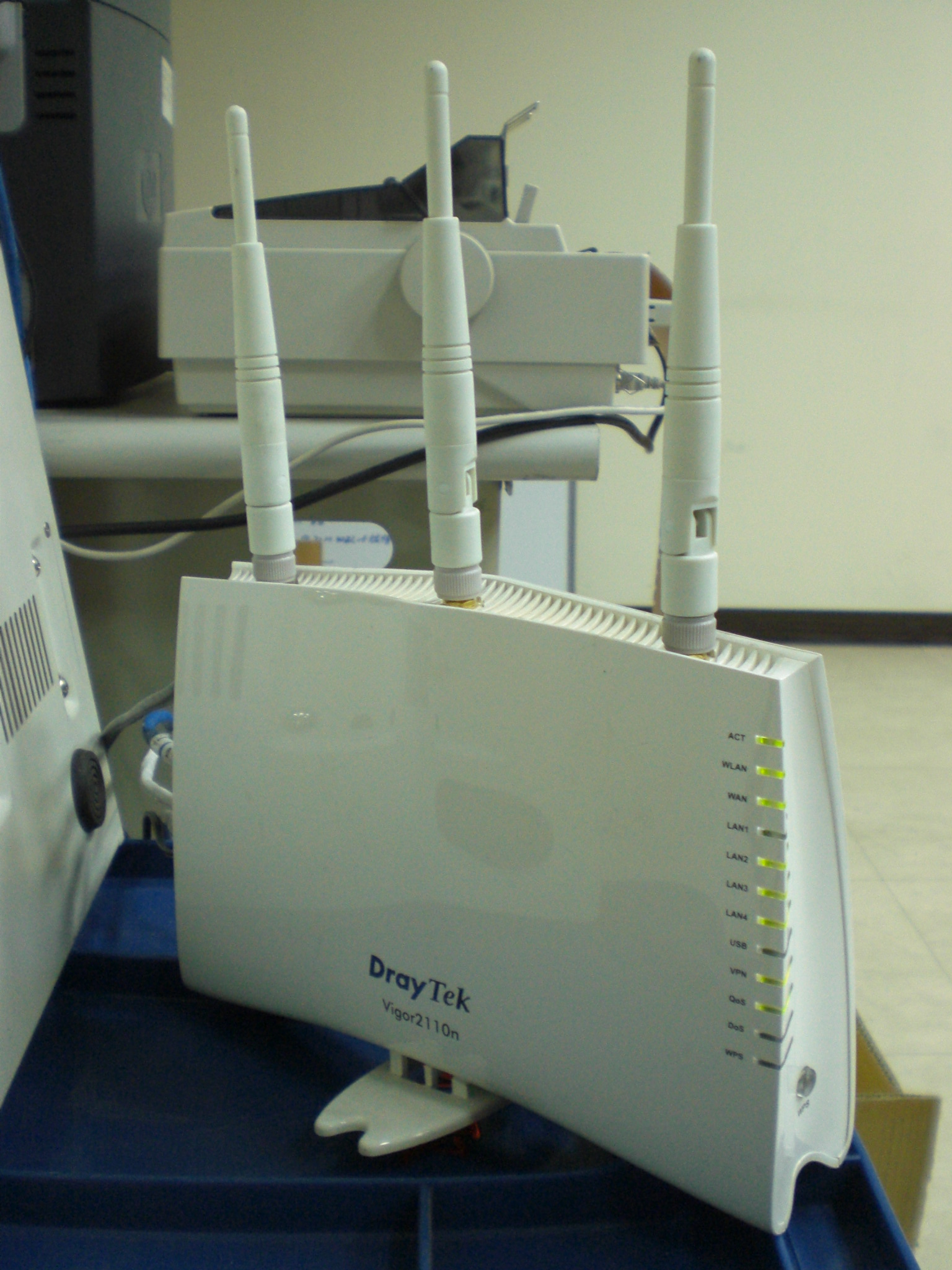 居易科技無線路由器Vigor2110n。